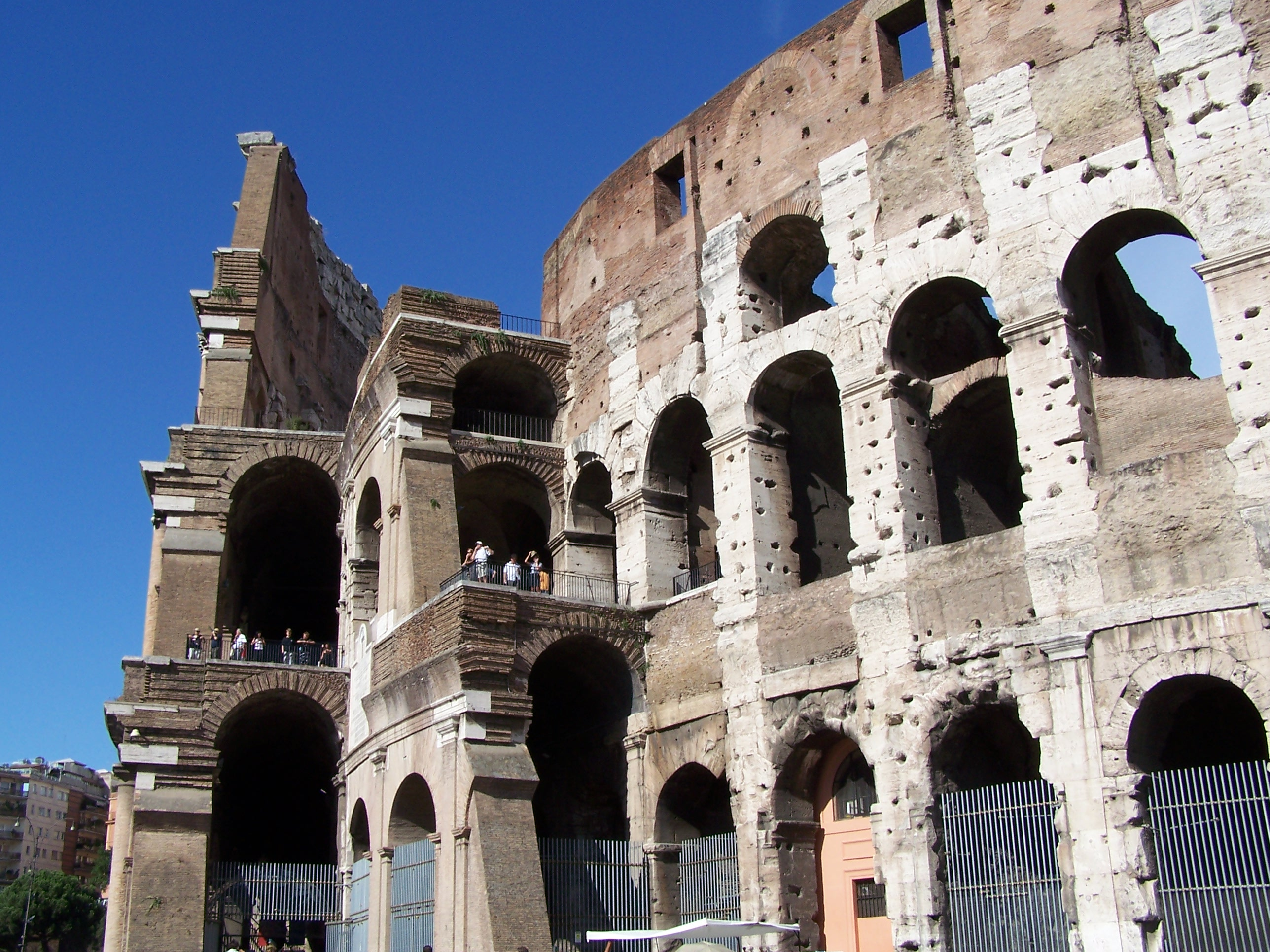 Fassade über dem Kolosseum-Eingang